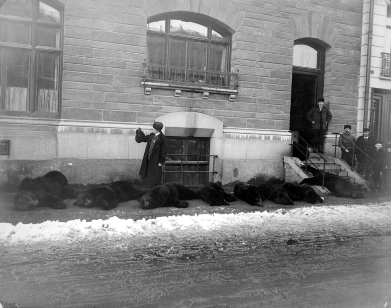 Greve Eric von Rosen med skjutna björnar utanför Strömgatan 20